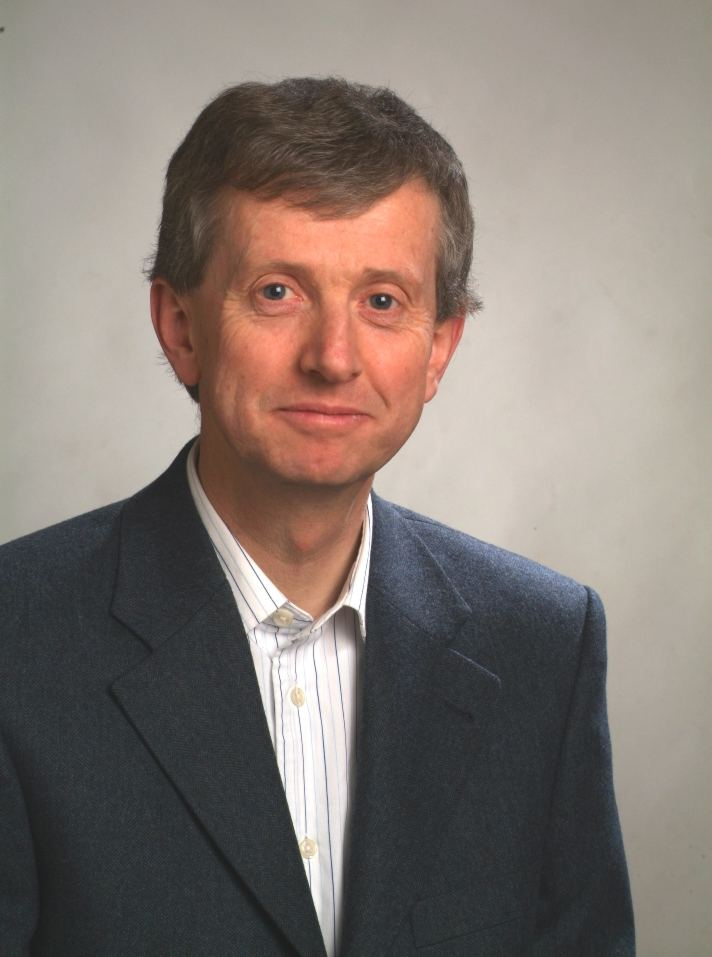 Porträt J Jenni